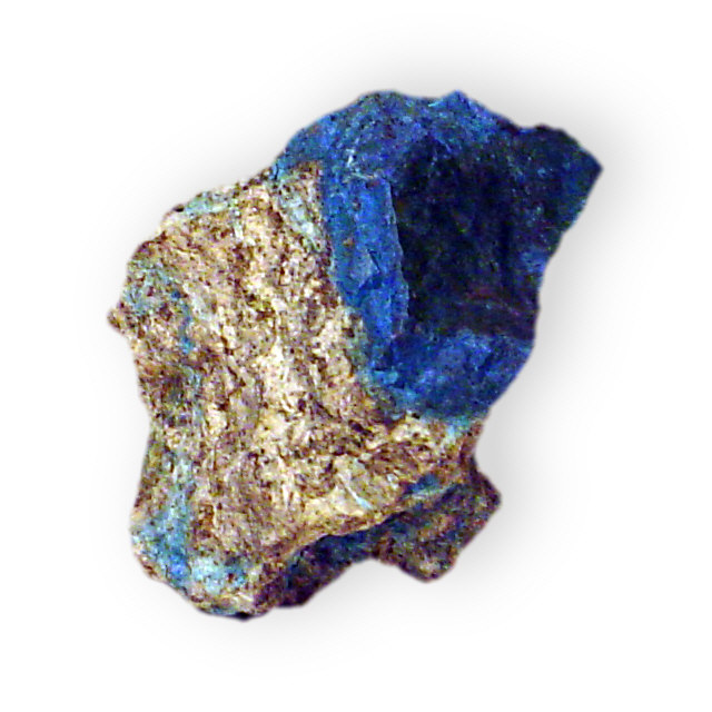 Aerinite, Chemical Composition; Iron magnesium calcium aluminum silicate Location;Estopinian Huesca Province Spain